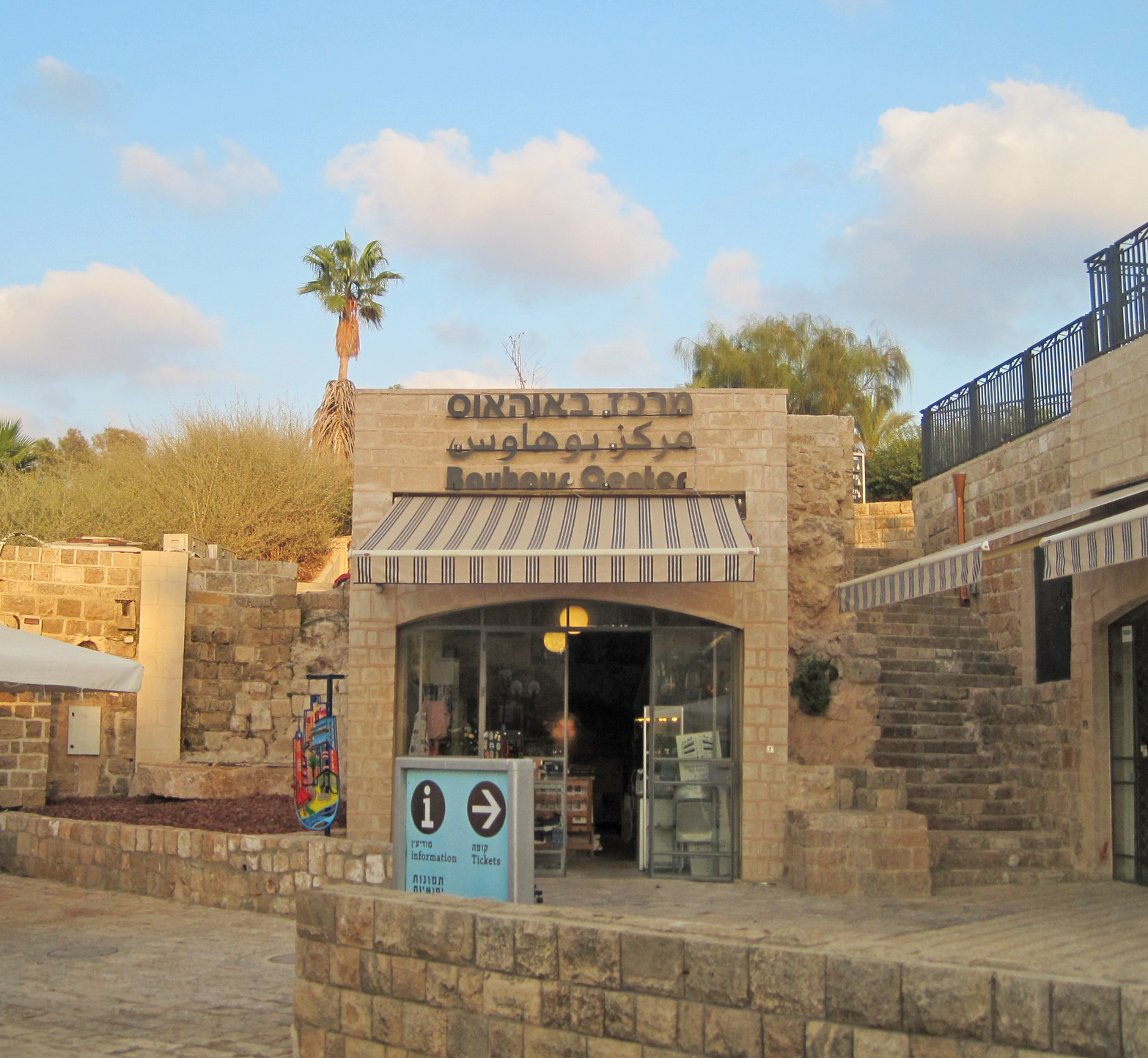 מתחם יפו העתיקה - יפו ההיסטורית, מוגדר כיום כשטח שהיה מוקף חומה במהלך המאה ה-19, מראש גבעת הכורכר של יפו ובמורד מדרונותיה, מרחוב יפת במזרח ובצפון ועד קרפיפי הנמל/הים במערב, ובדרום רחוב לואי פסטר.